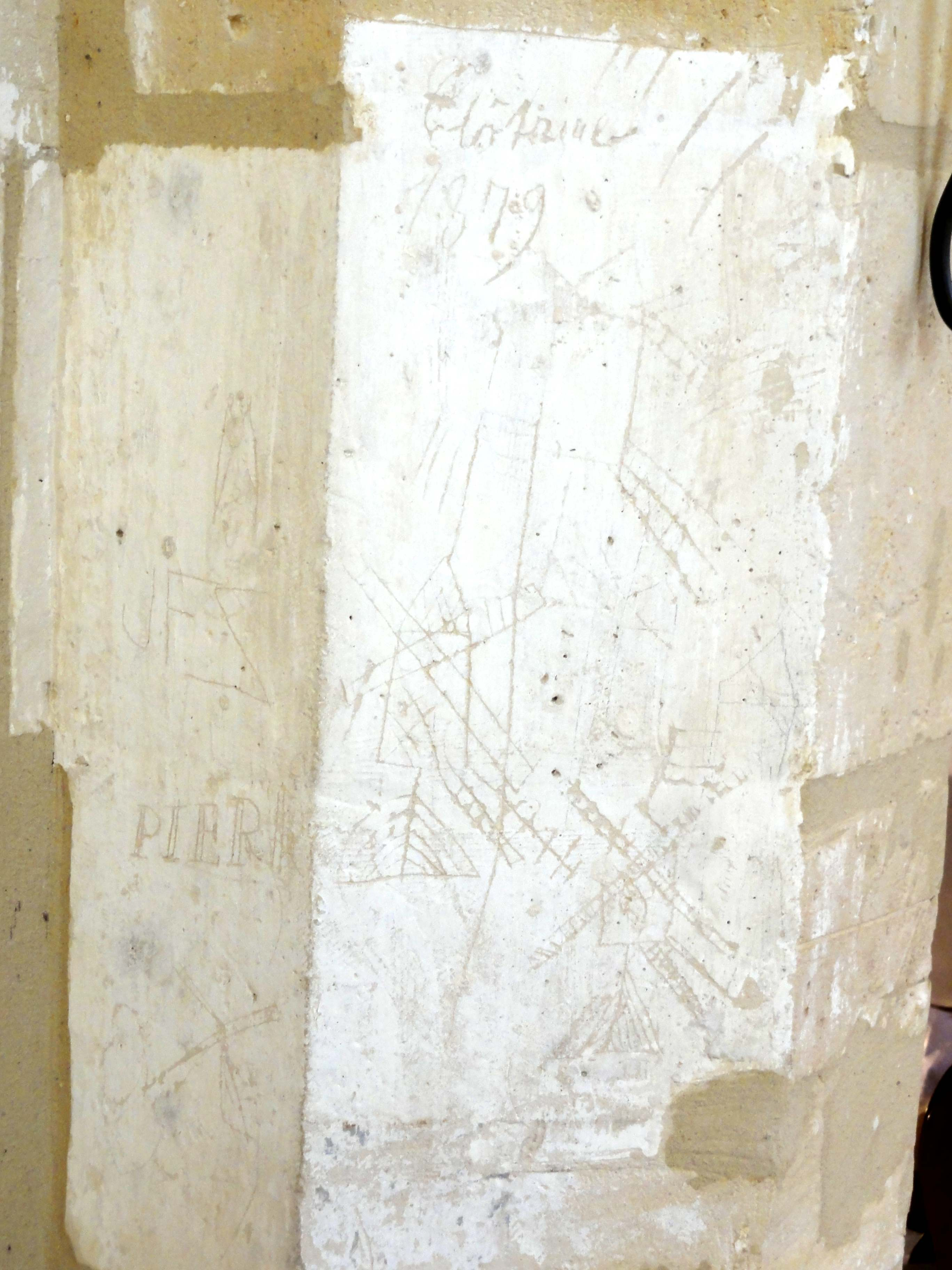 Chapelle sud, 1ère travée, graffiti sur la pile sud-est du clocher (moulins à vent, 1879).